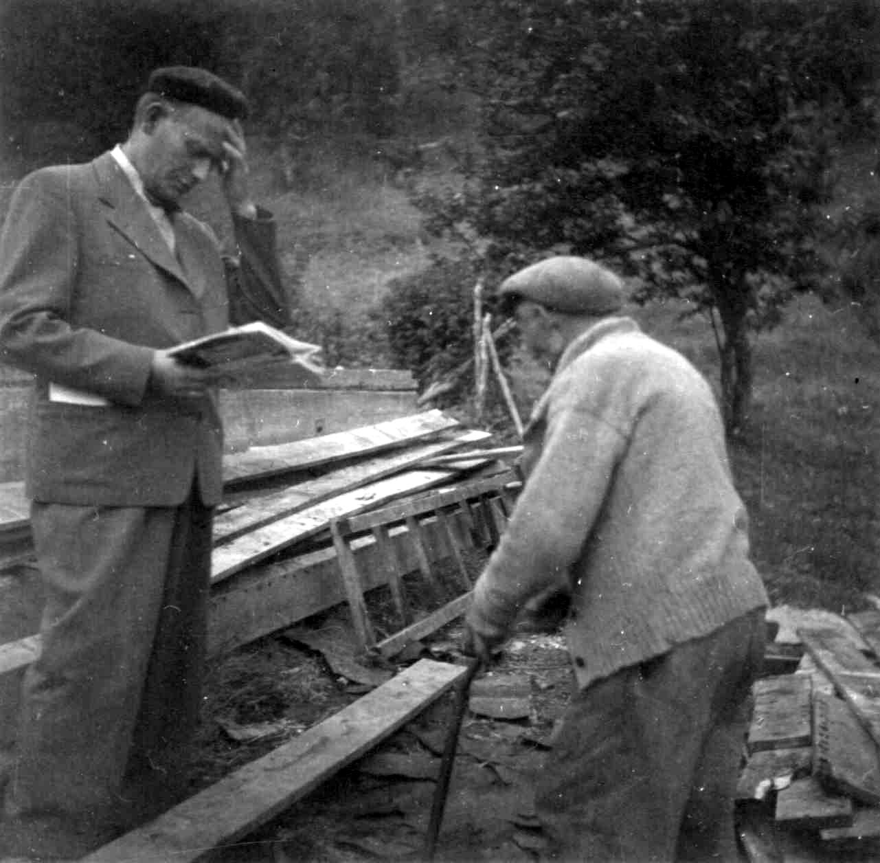 Amma Pavvel i samtale m. dr. Israel Ruong, 1954.